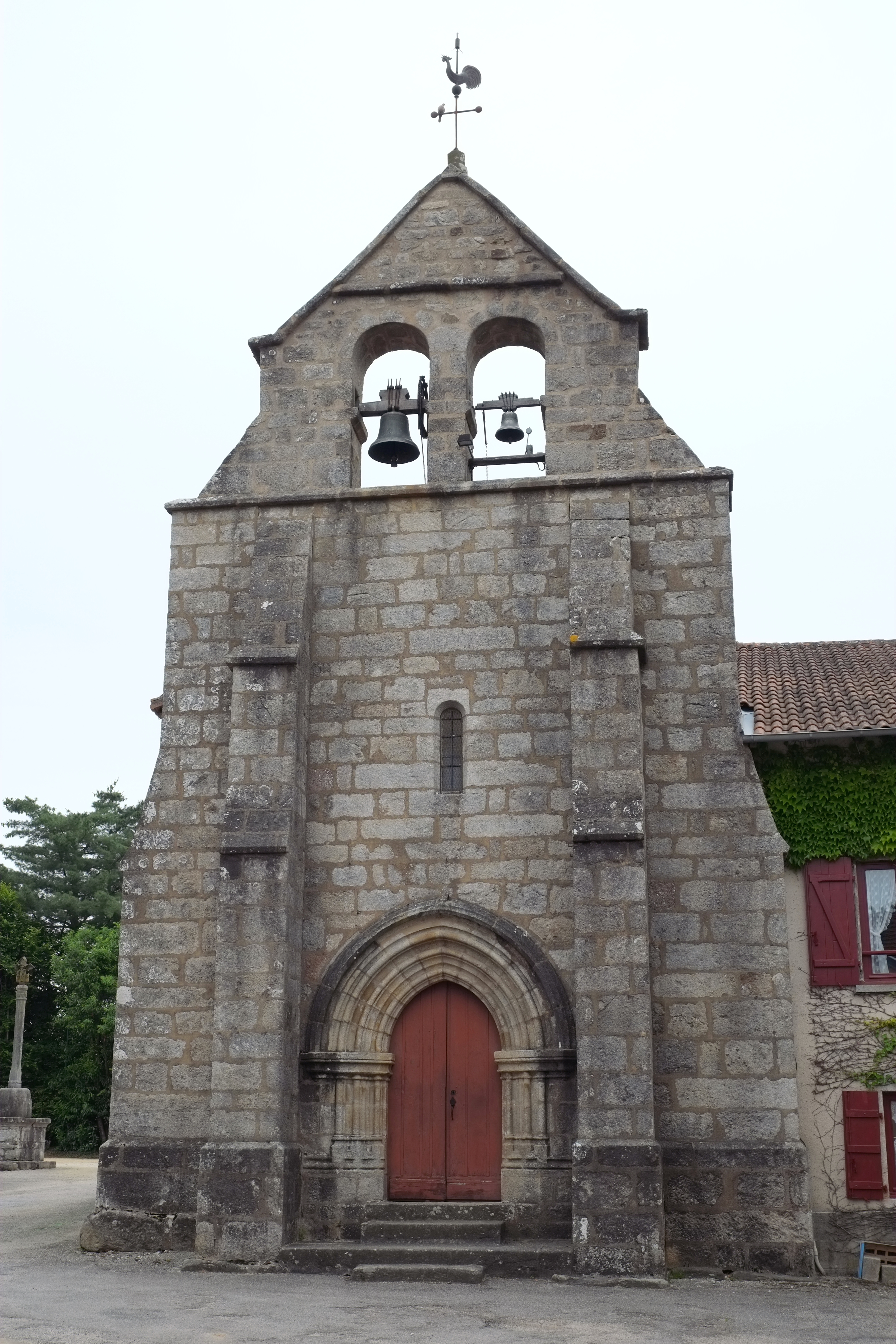 Kirche in La Geneytouse im Département Haute-Vienne in der Region Centre (Frankreich)